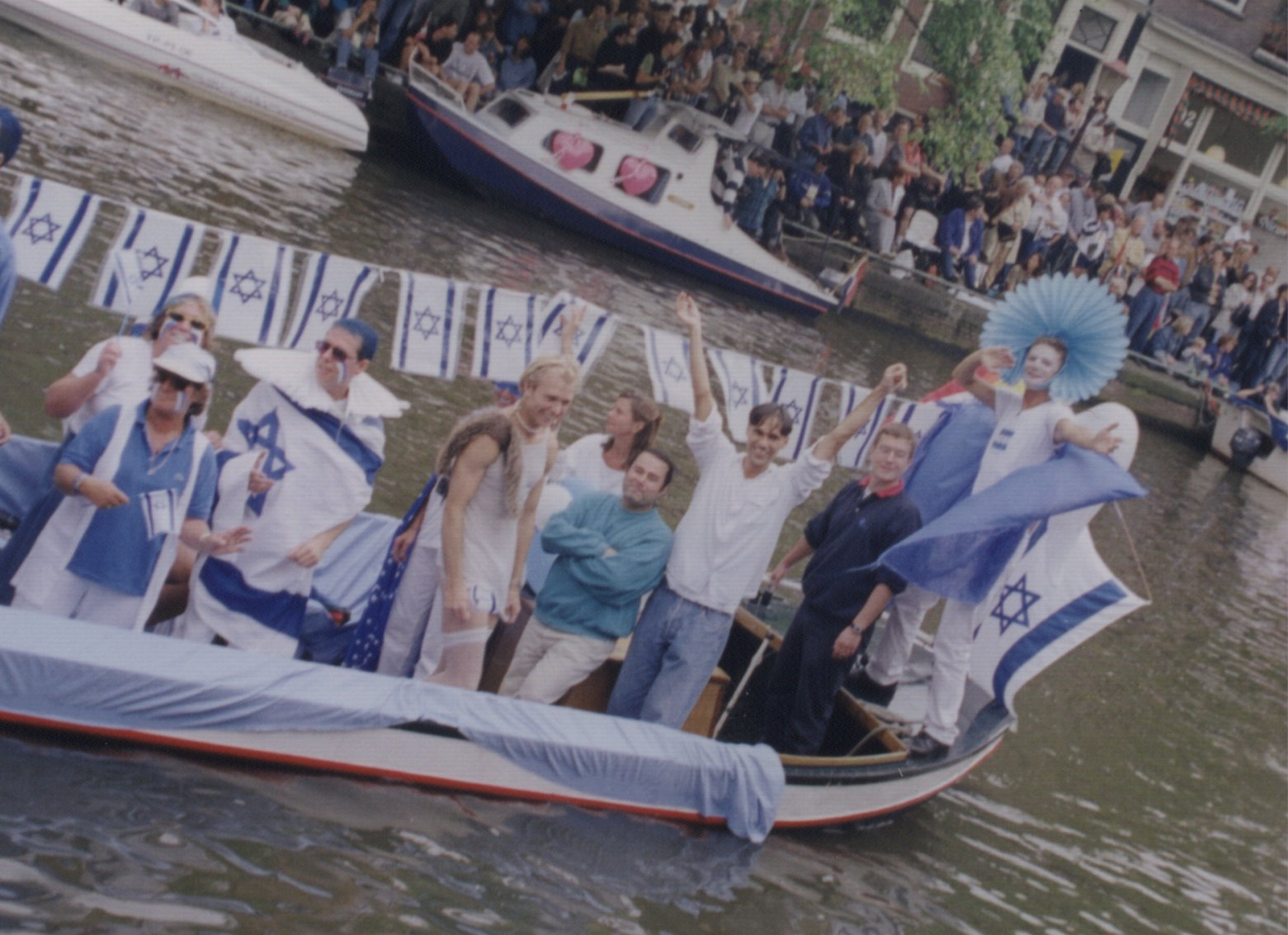 סירת האירגון הגאה היהודי באמסטרדם, "שלהומו", ב"מצעד הסירות", לפני טקס הפתיחה של המשחקים הגאים, 1998